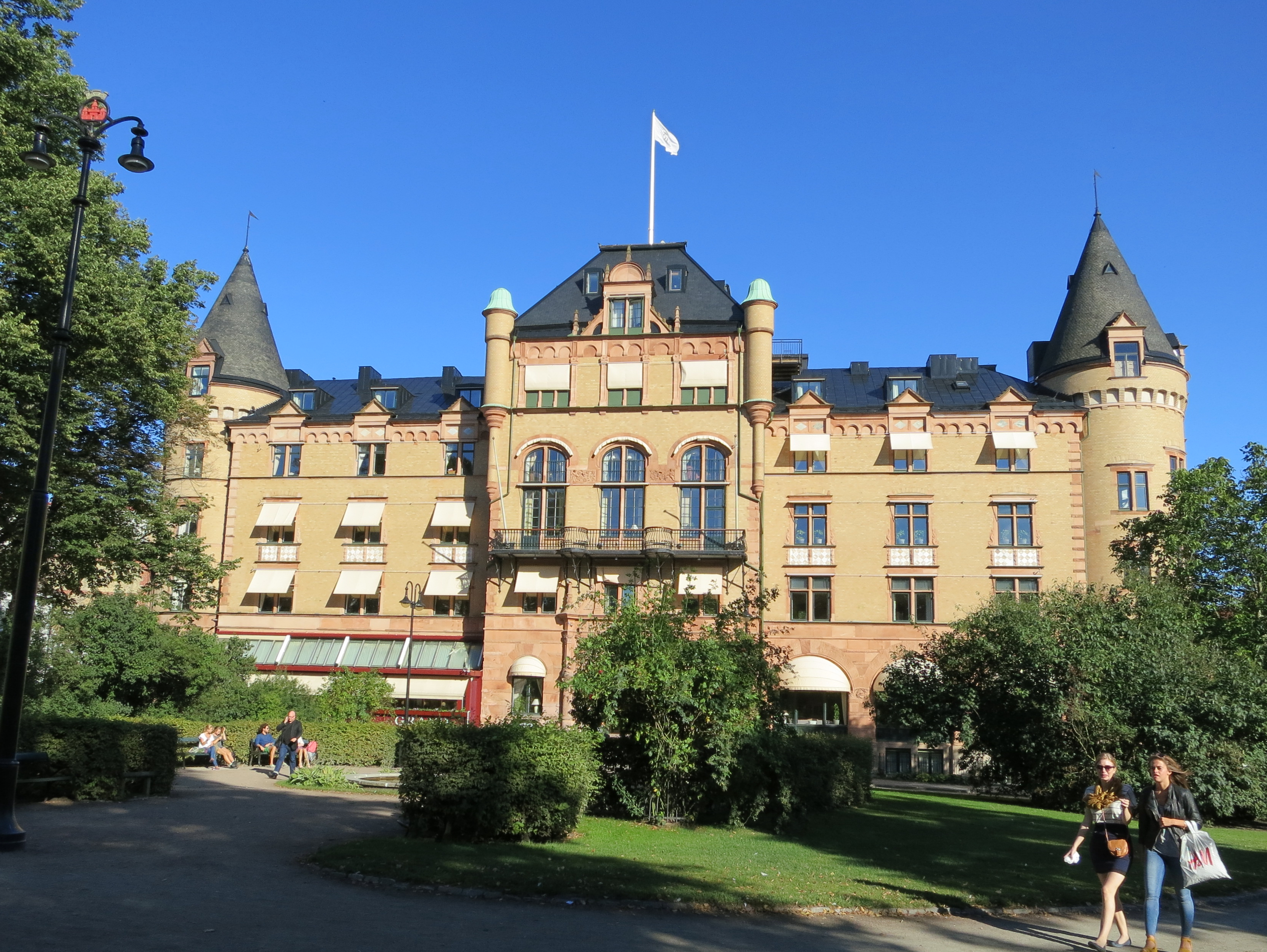 Grand hotel från Bantorget, Lund